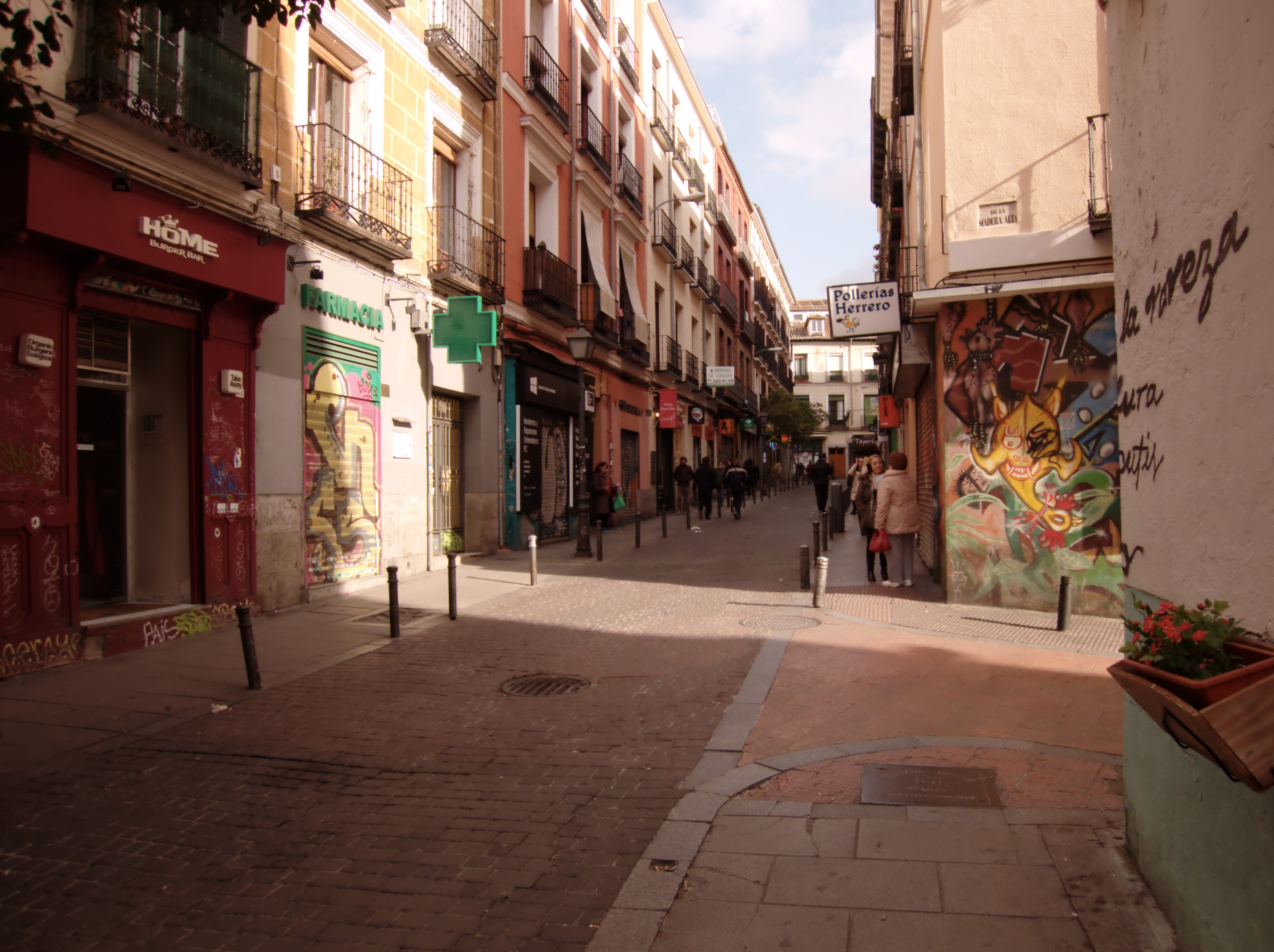 Madrid